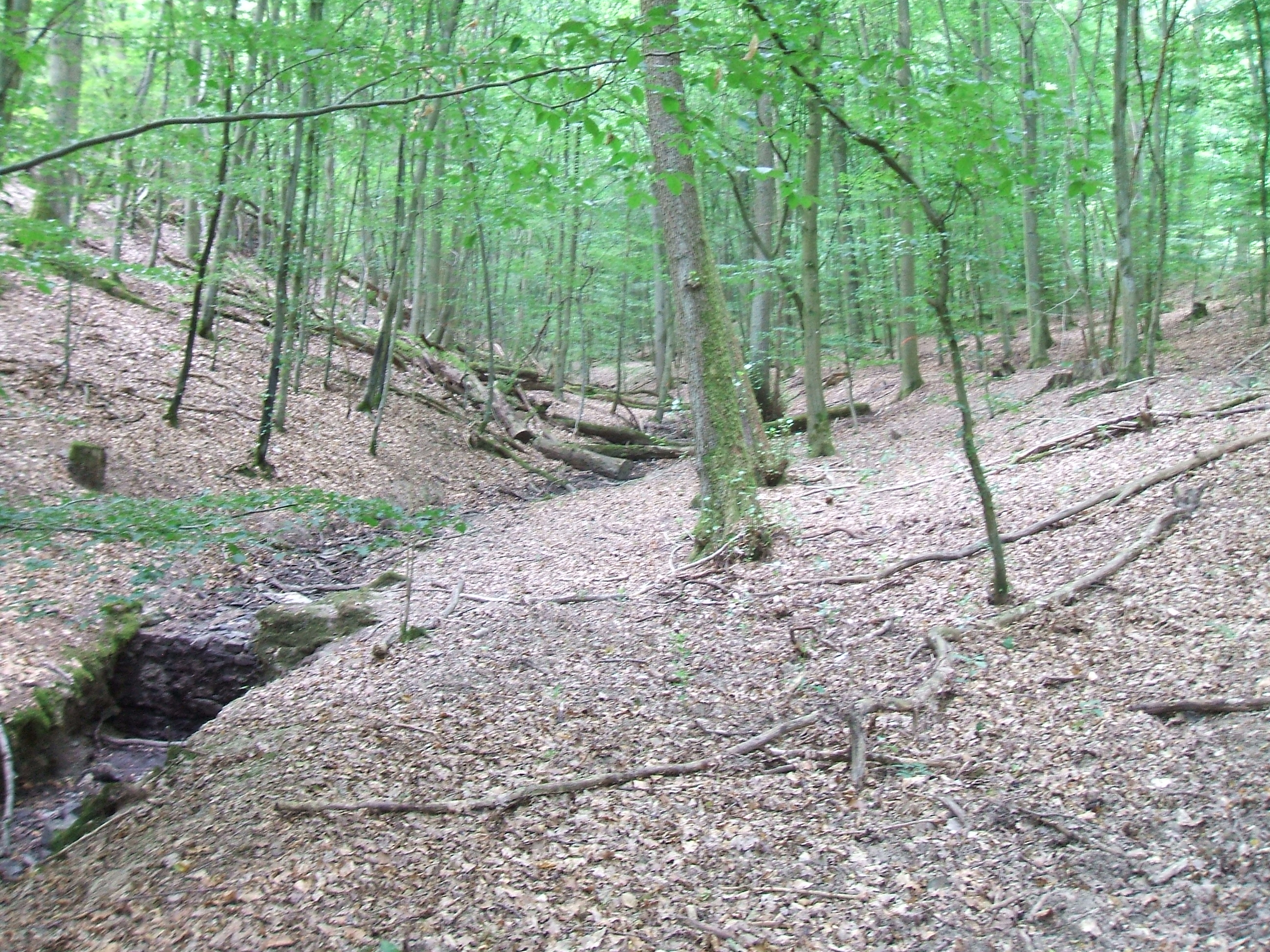 Alte Staumauer im Bach des Schiefertals, bis obenhin verfüllt